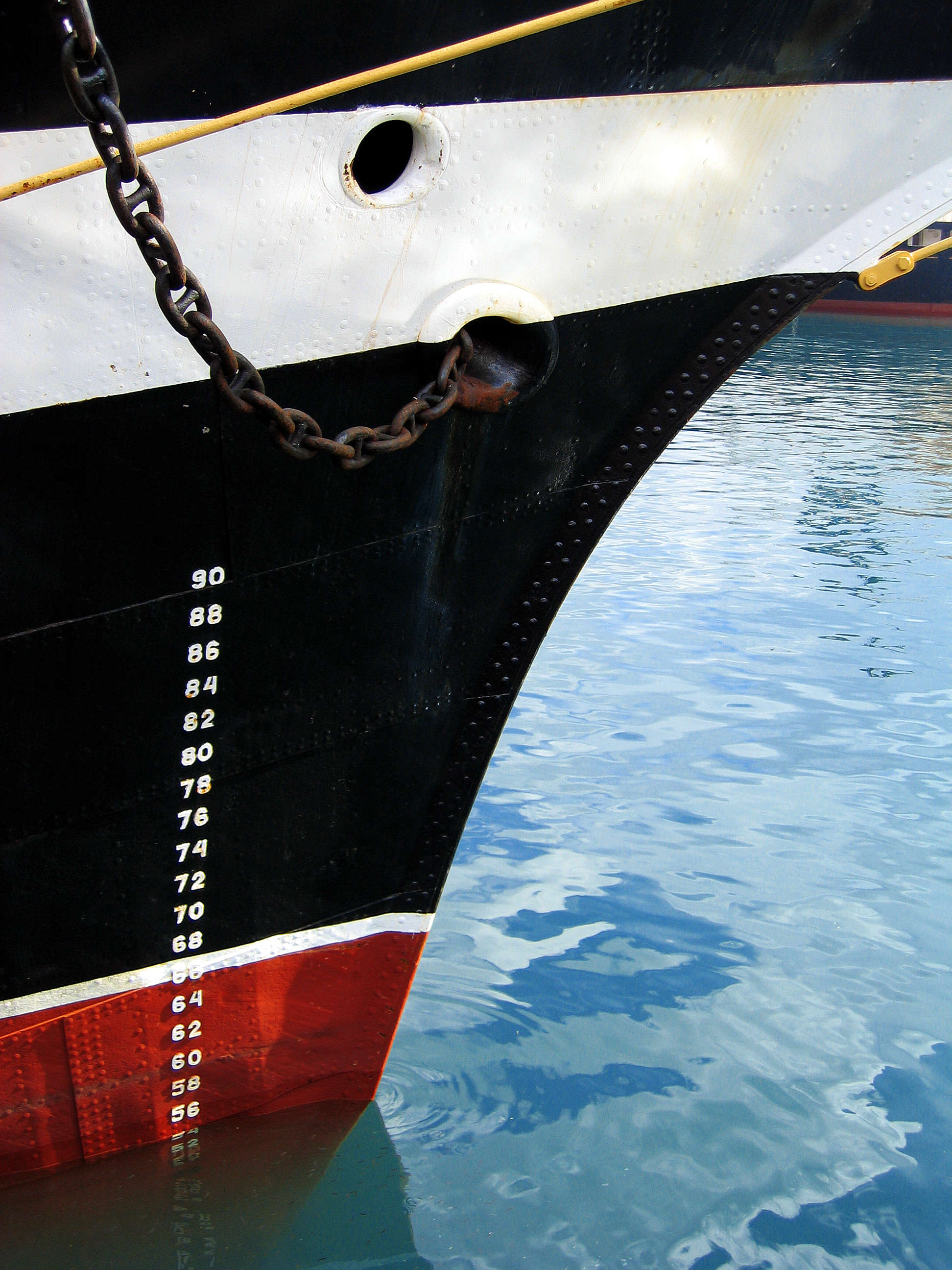 Tiefgangsmarke am Bug der Krusenstern im Hafen von Gijón, Asturien, Spanien.